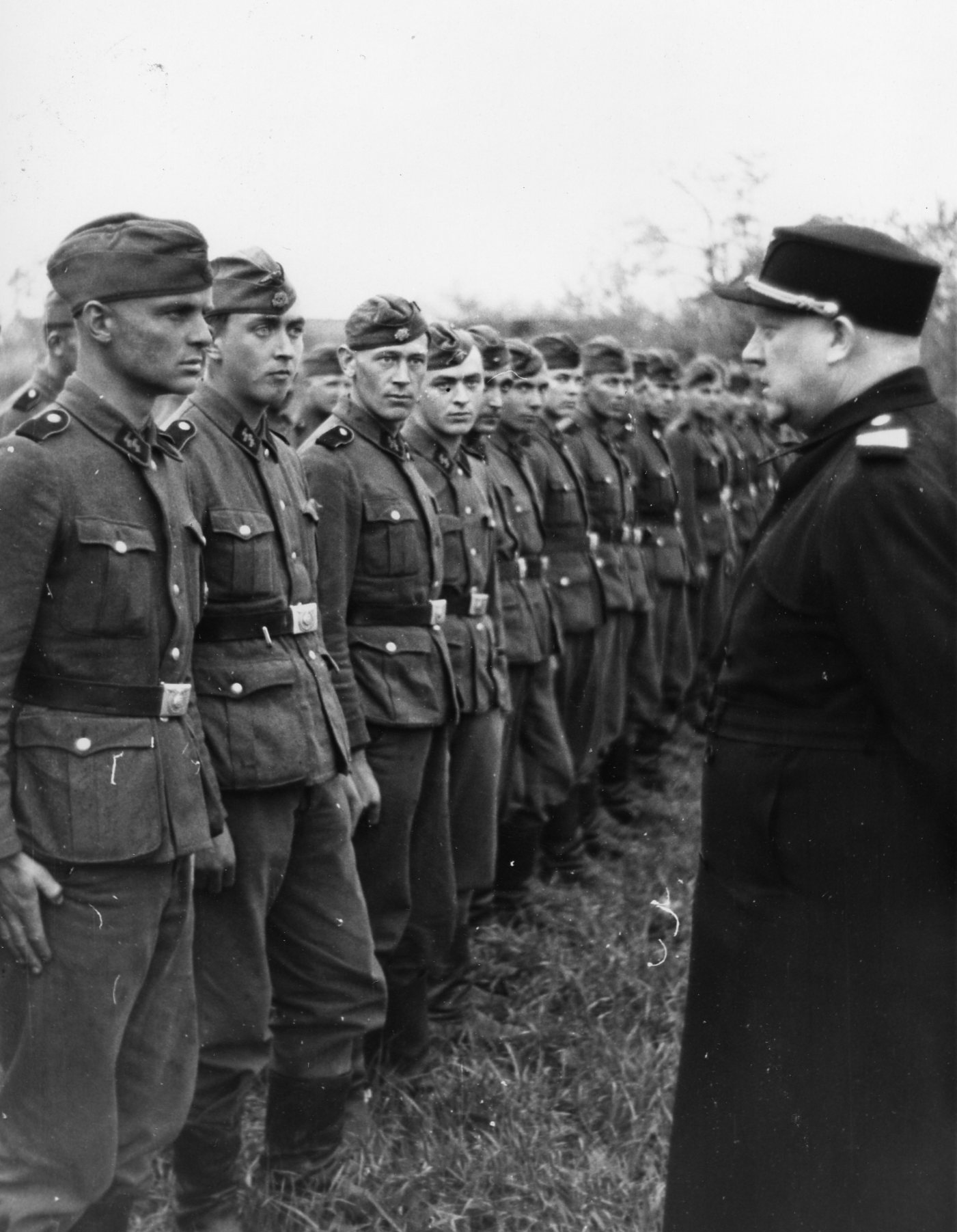 Kalinowo. Uspenskaja. Mai 42. Norges statsminister besøker norske frivillige hos en divisjon til Waffen SS. De frivillige forteller (rapporterer?) norske statsministeren personlig om innsatsen. 1942/05